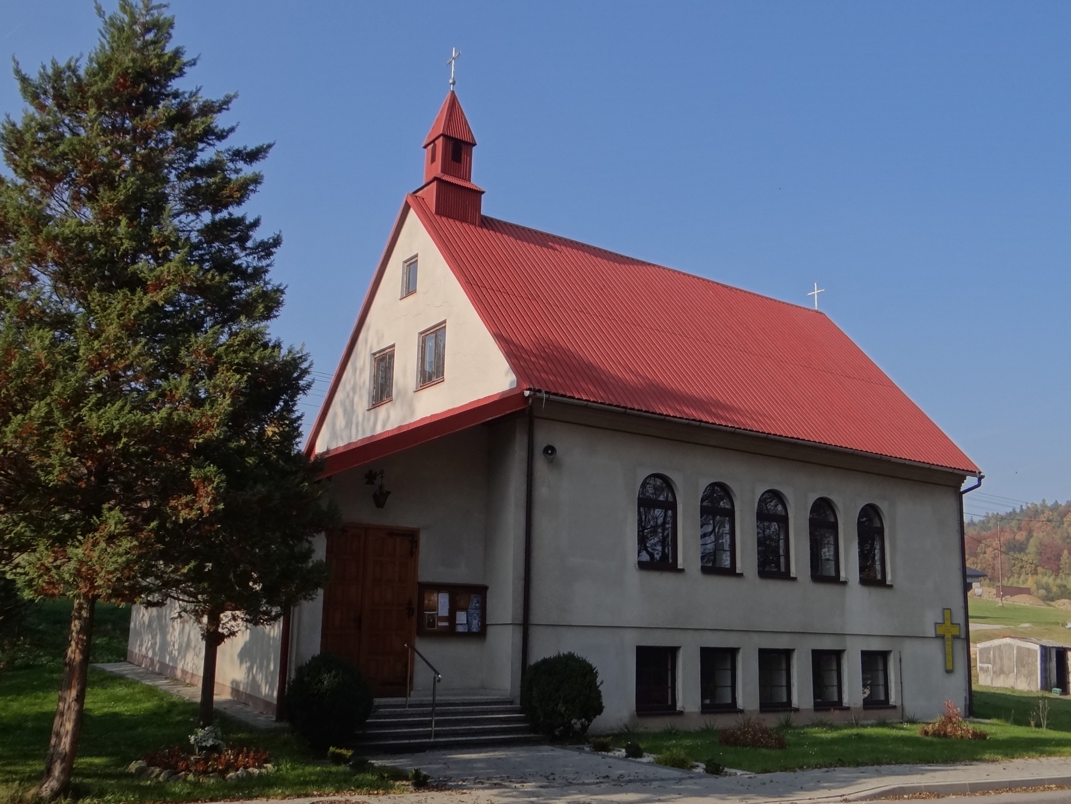 Kościół w Jaszczurowej